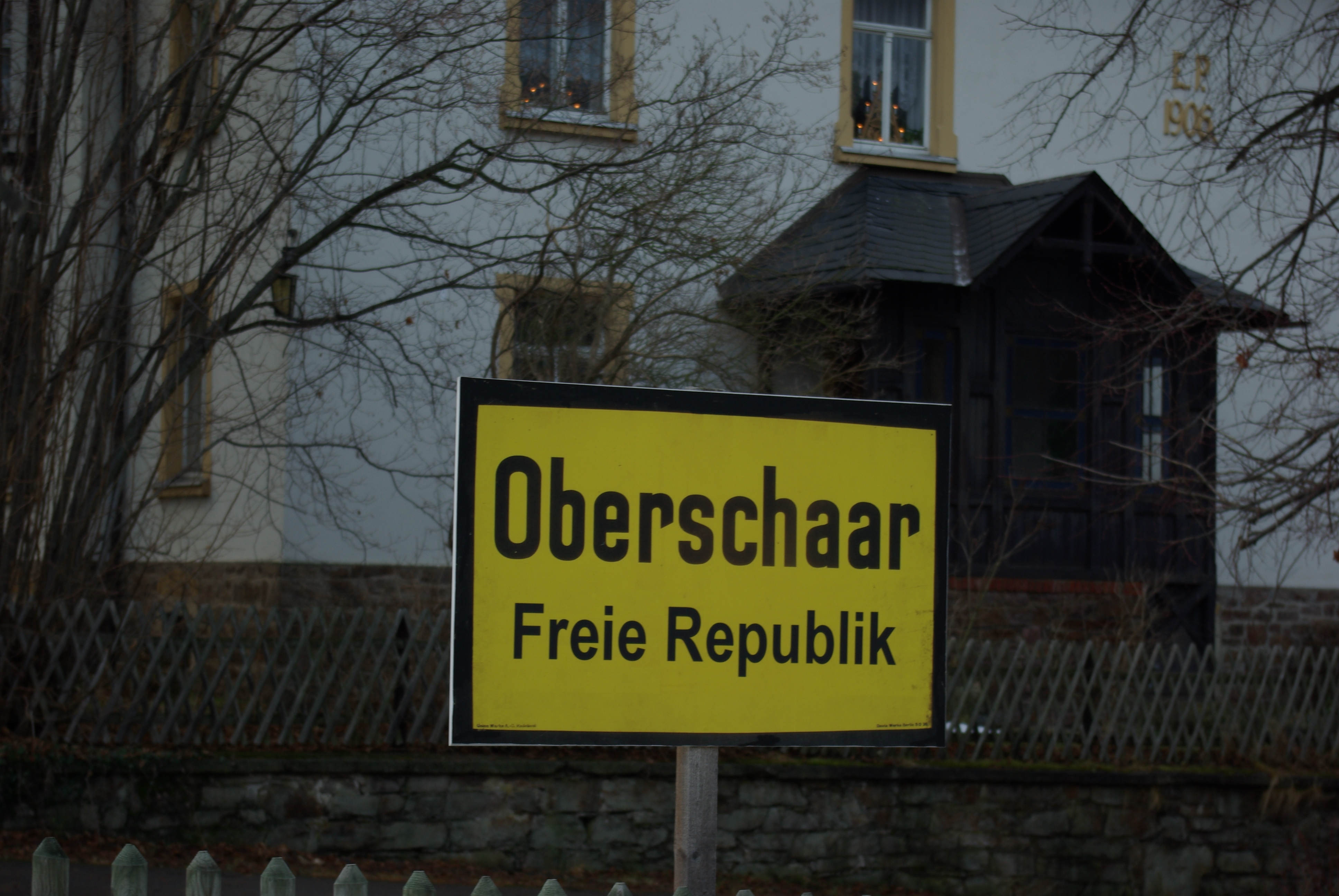 Oberschaar